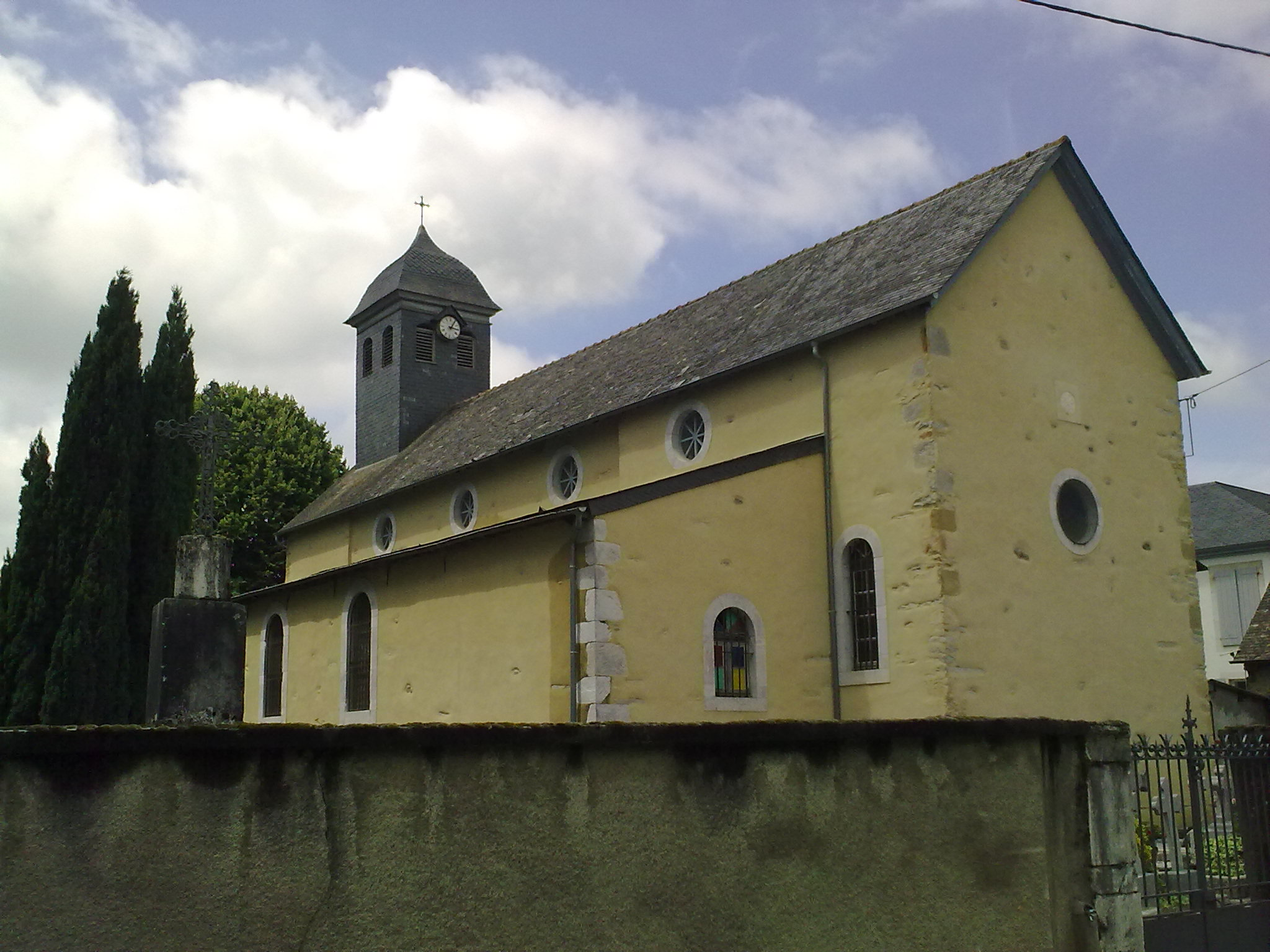 Nousty le 13 juin 2010.